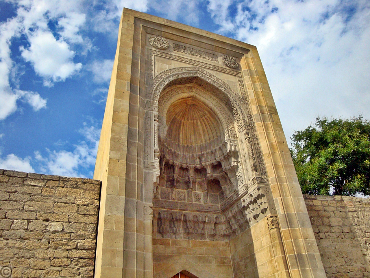 İçəri Şəhər, Şirvamşahlar kompleksi, portal